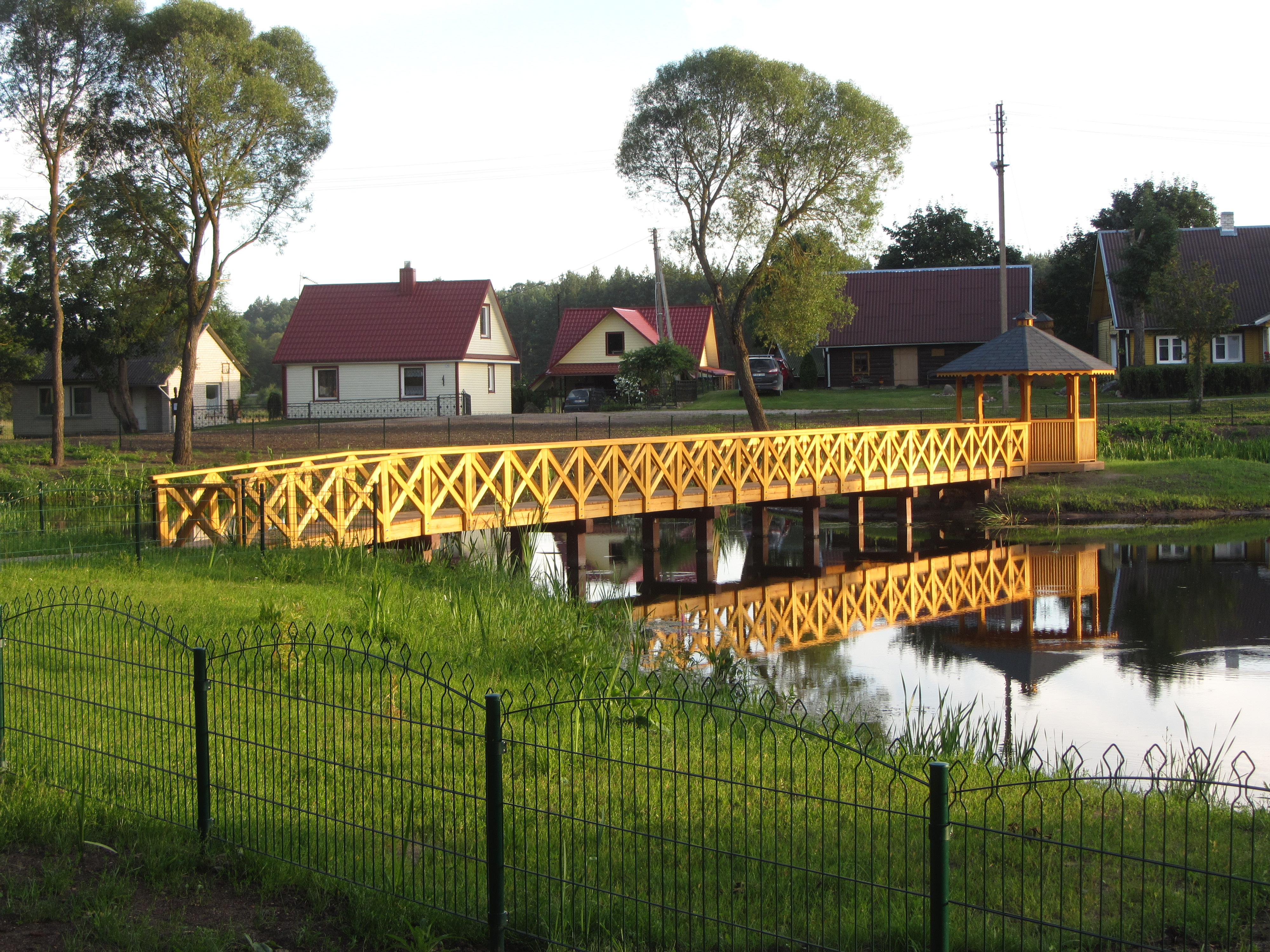 Kuktiškės, Lithuania